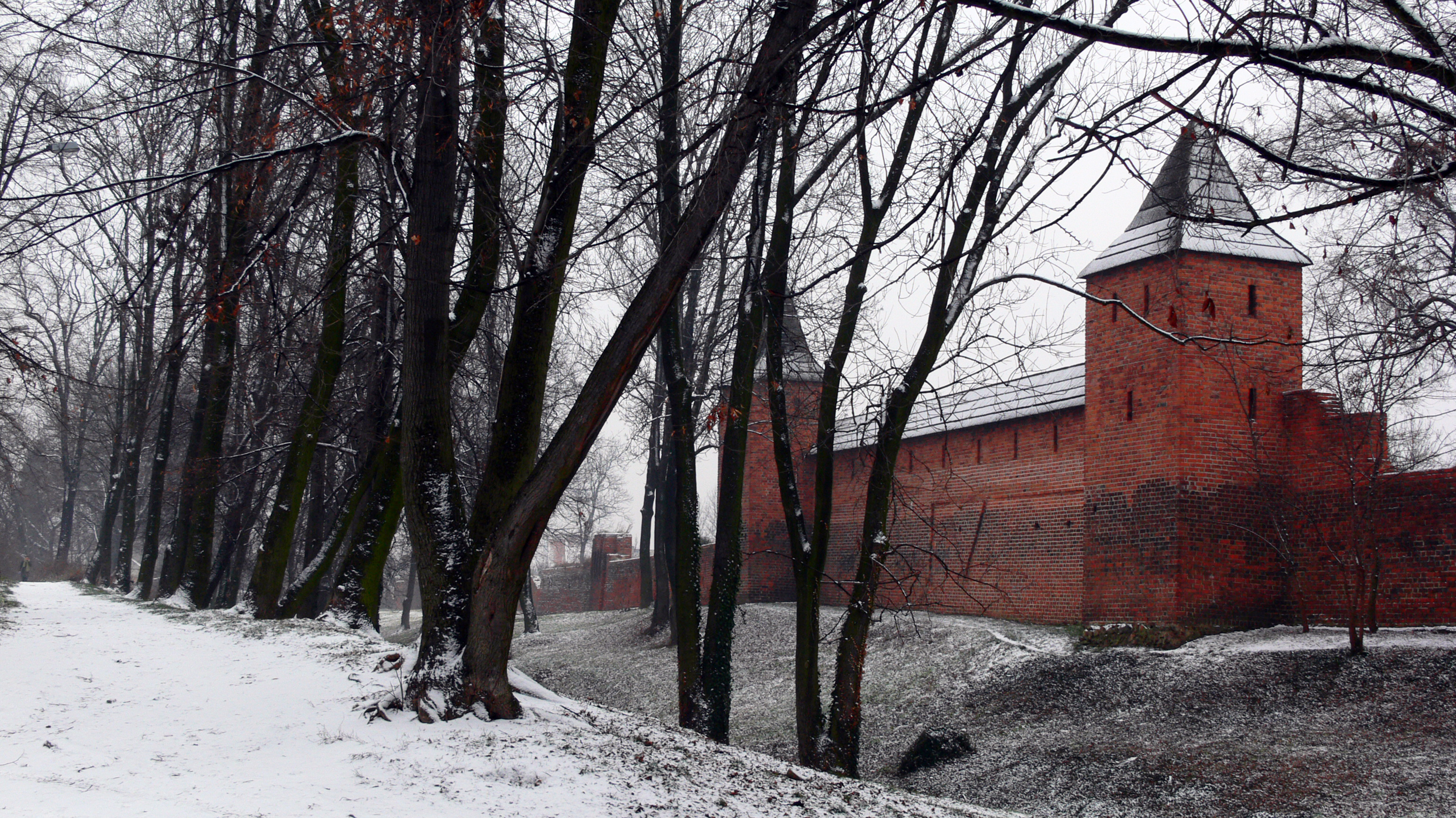 Środa Śląska mur miejski, XIII-XIV w.